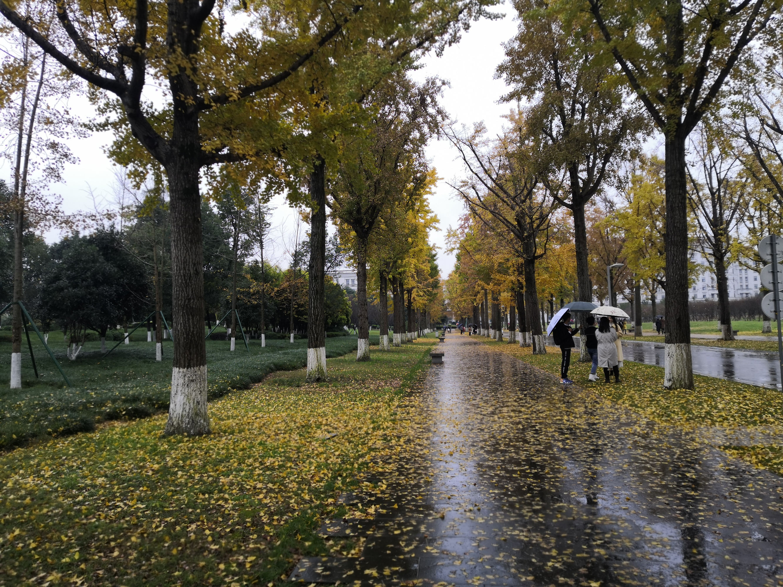 电子科技大学银杏大道